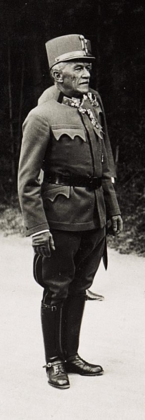 General der Infantrie Sándor Szurmay bei der 180. Promotion in der Geschichte des Militär-Maria-Theresien-Ordens am 17. August 1917 im Schloss Wartholz. Es handelt sich hierbei um einen Ausschnitt aus einem Gruppenfoto.